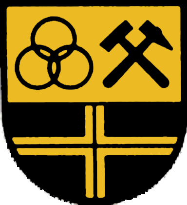 Wappen von Neuhof (bei Fulda)